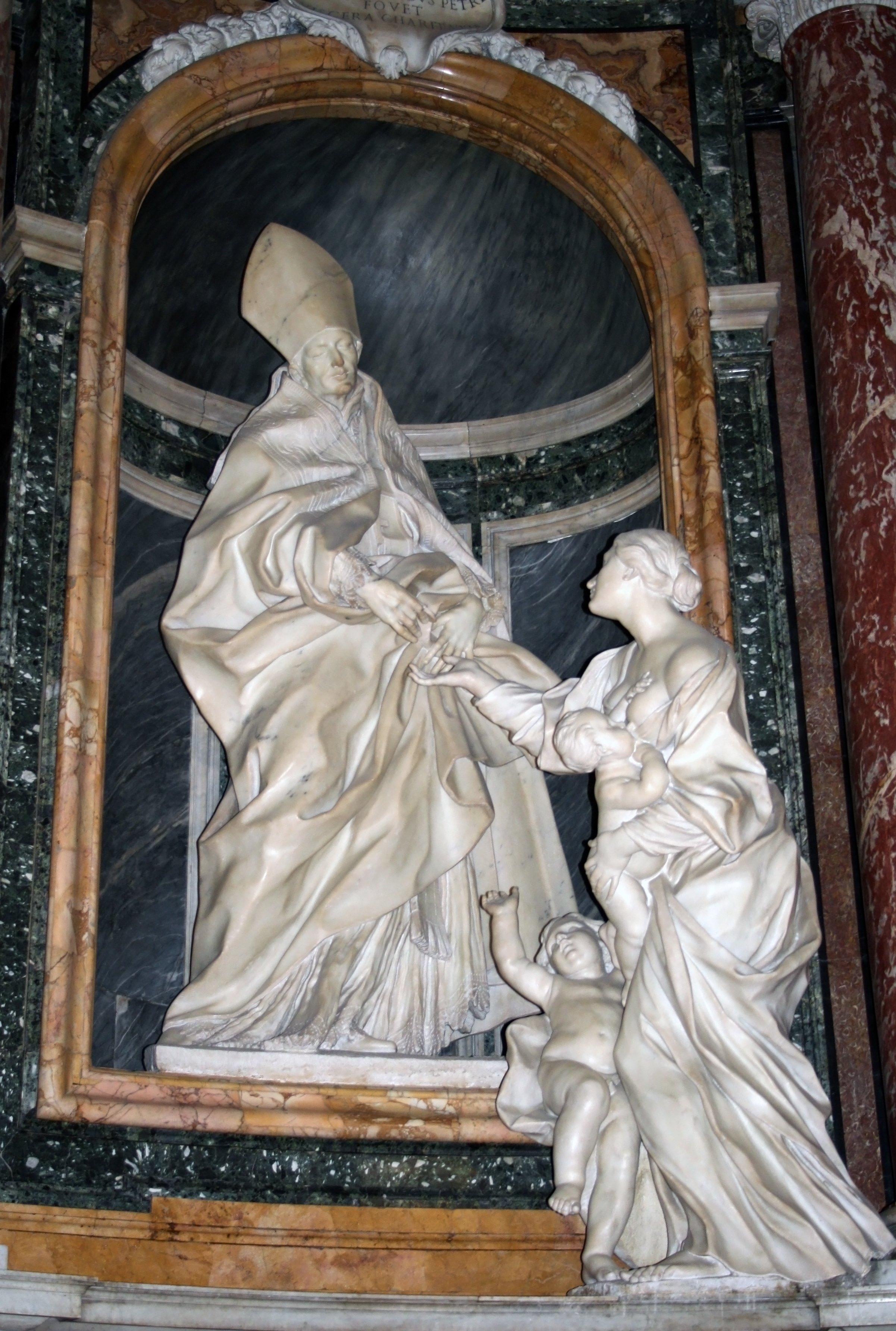 San Tommaso da Villanova, Chiesa di Sant'Agostino, Roma